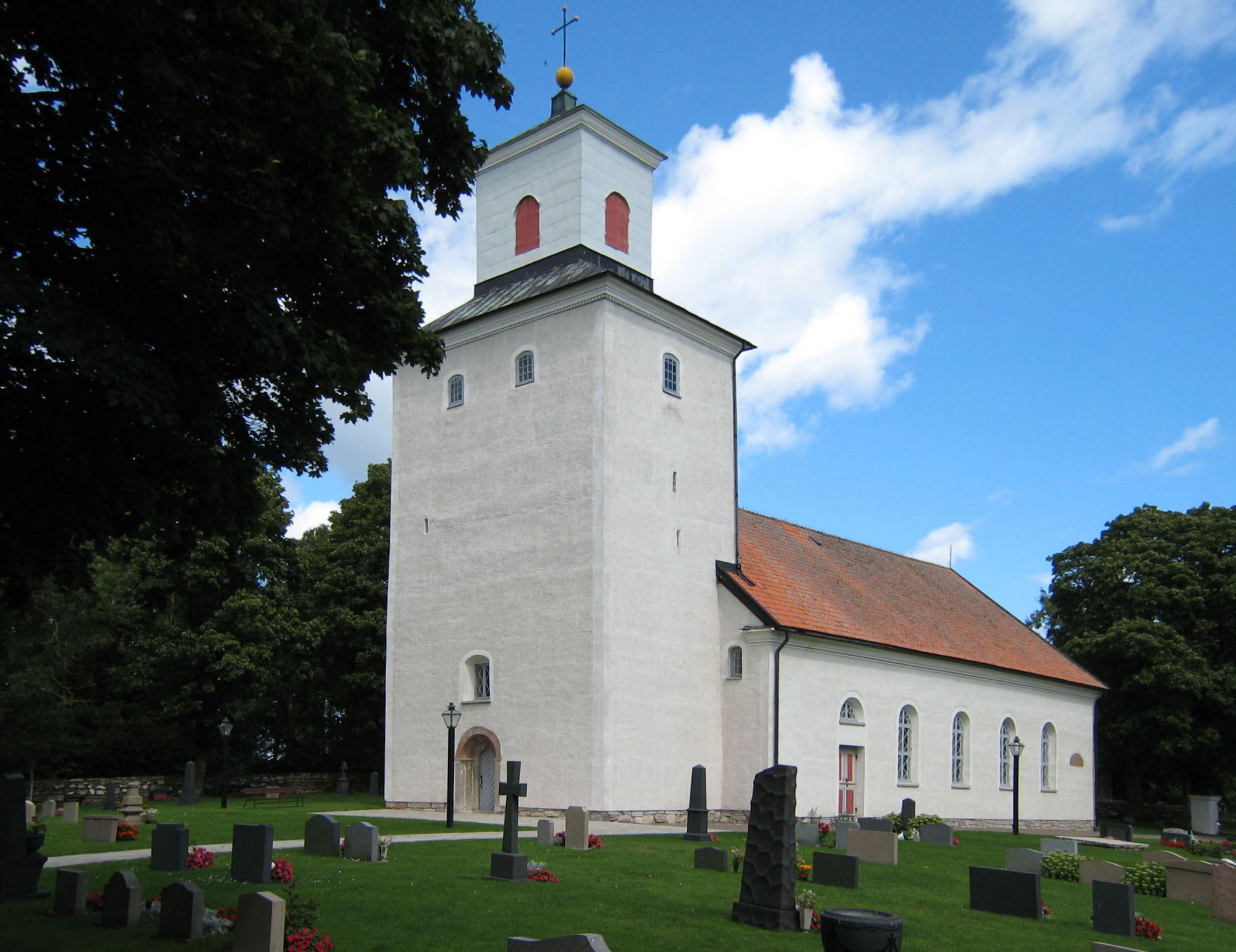 Norra Möckeby kyrka.